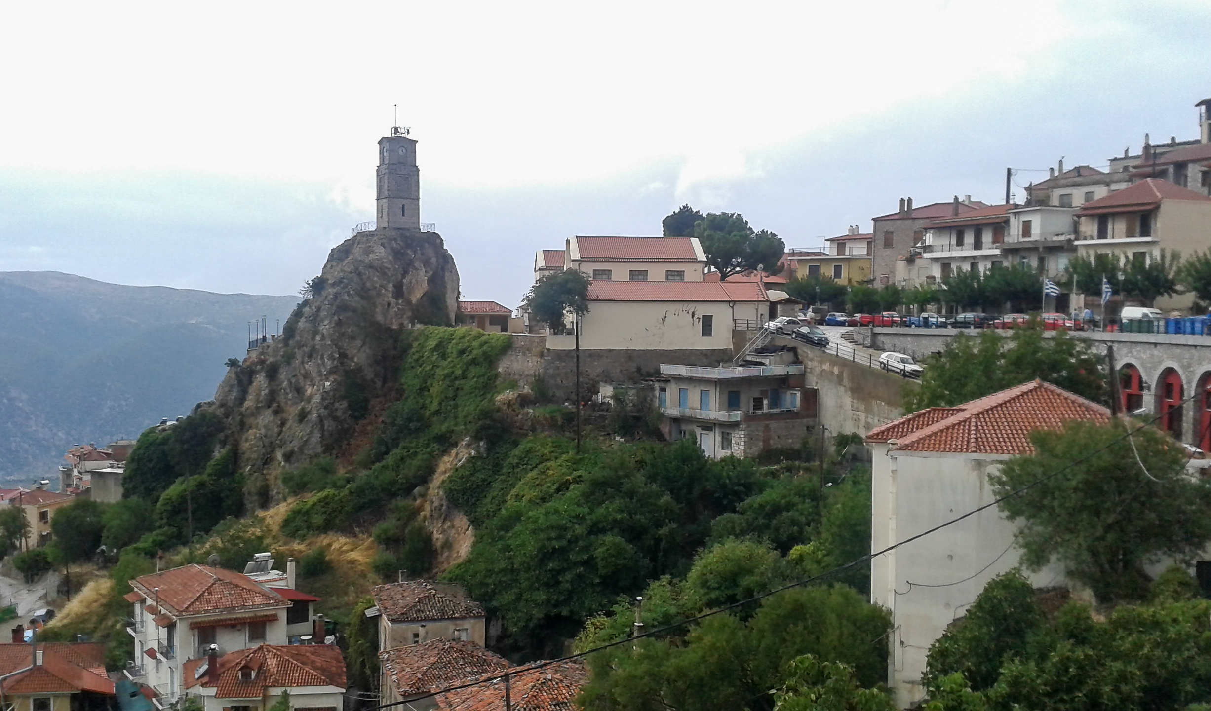 Blick auf Arachova, Griechenland.